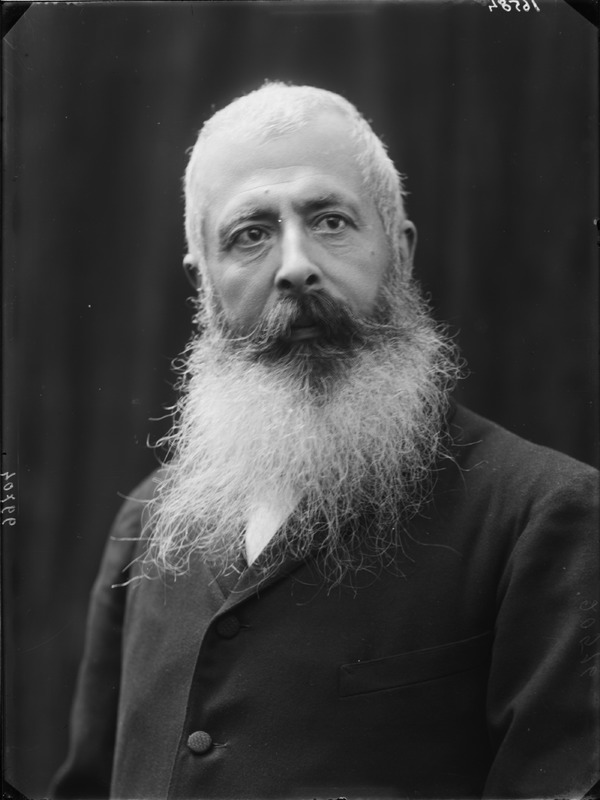 Pasquale Baccarini